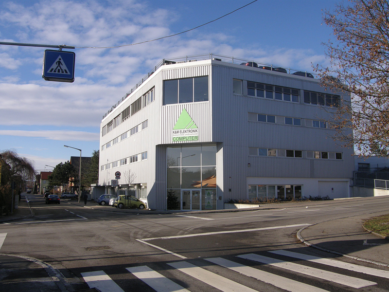 K&M Elektronik